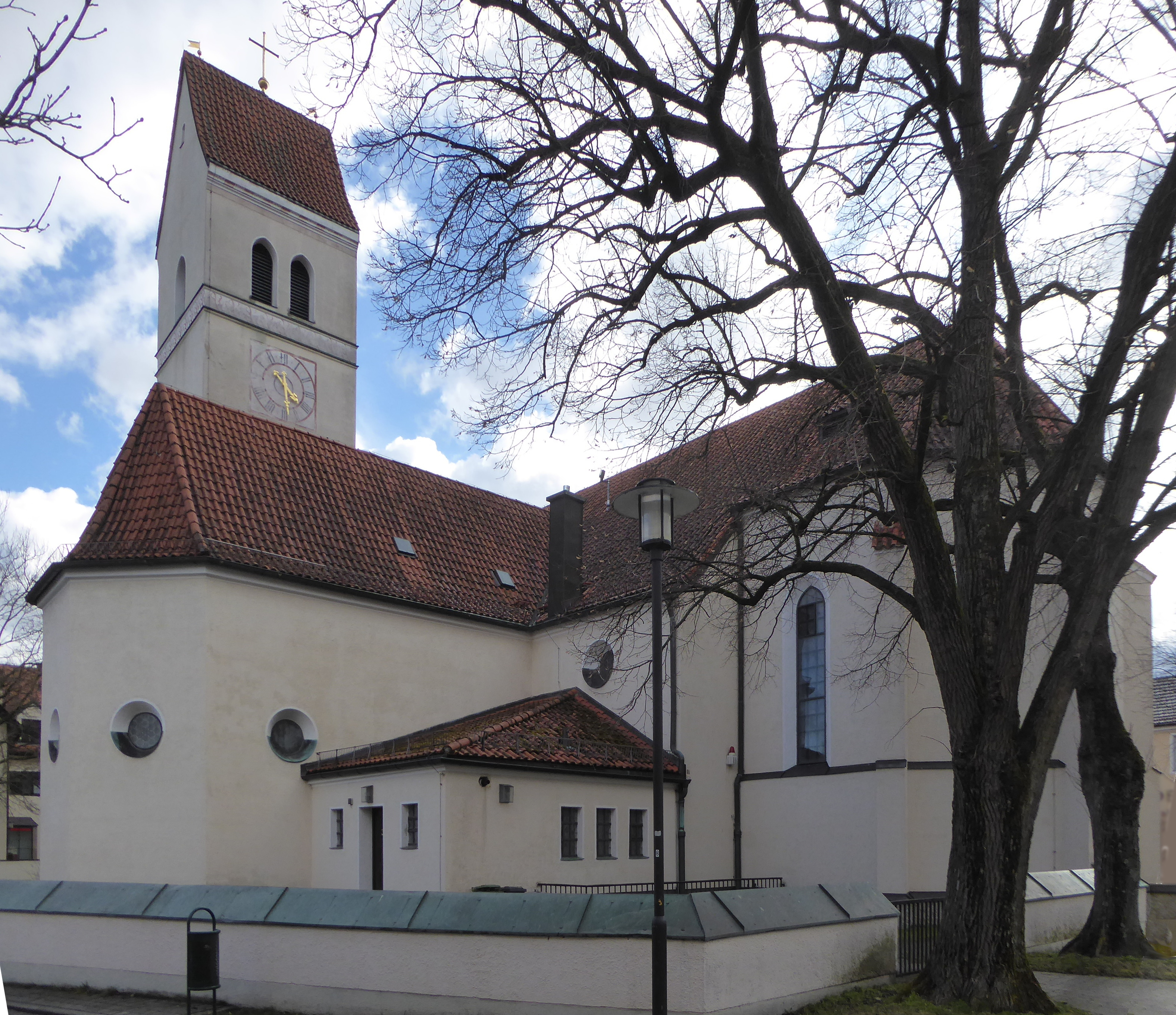 Feldkirchen (Lkr. München), Kirche Jakobus der Ältere, von Norden.